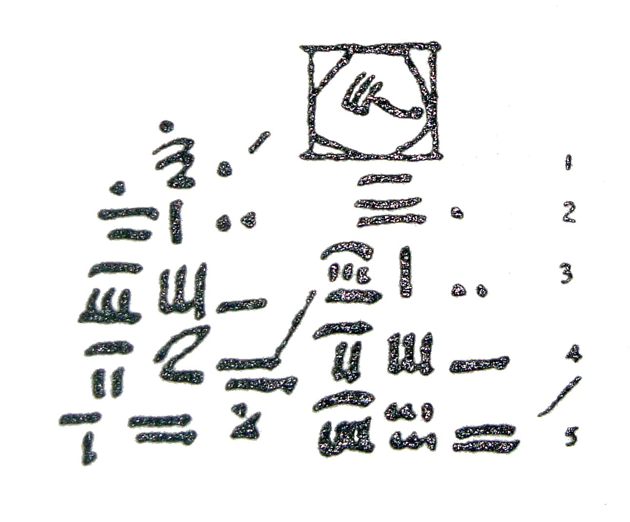 Problème R48 du papyrus Rhind